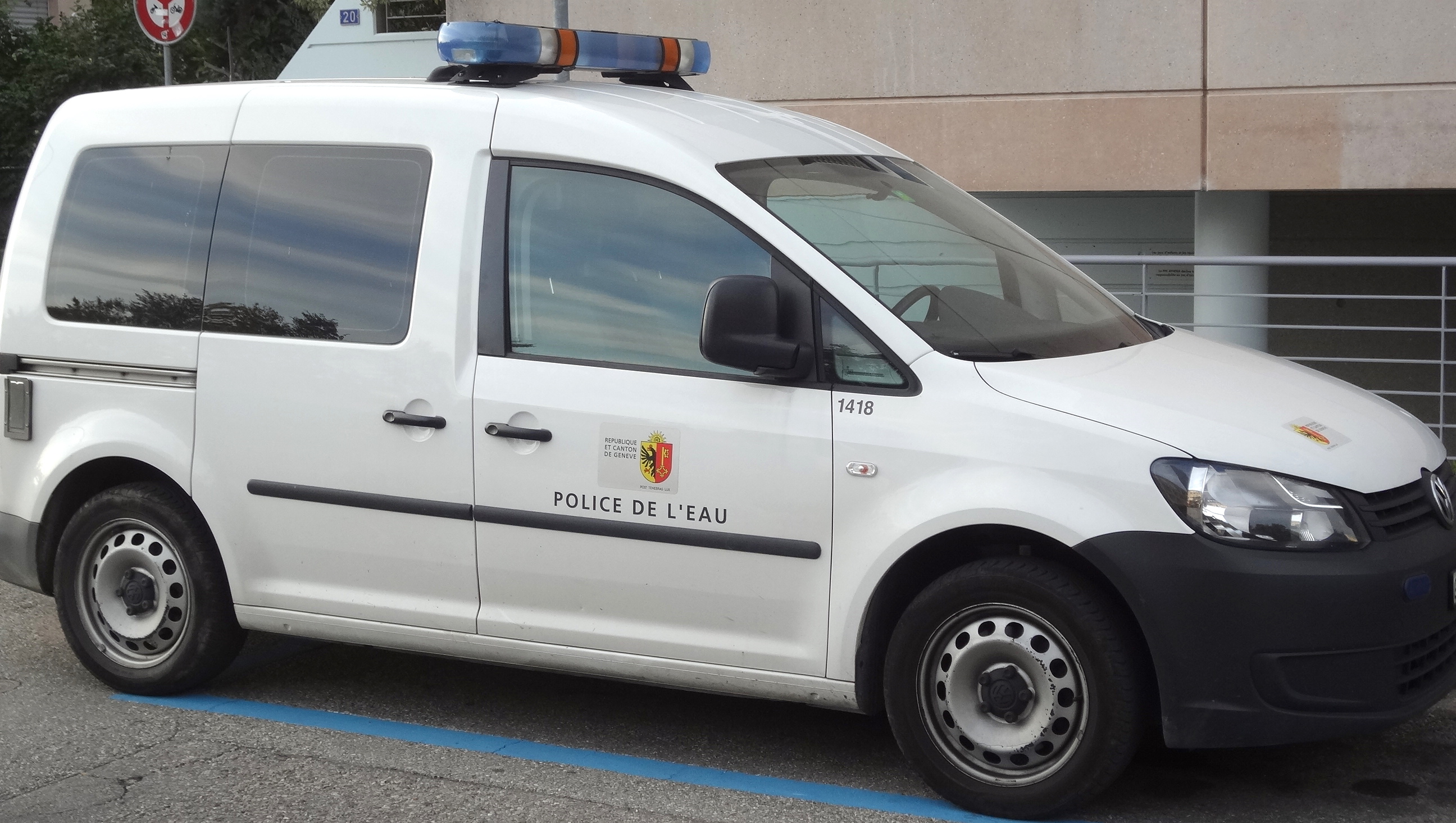 Véhicule de la Police de l’eau (PPE) du canton de Genève, dépendant de la direction générale de l'eau (DGEau). La Police des eaux a pour tâches la recherche des responsables de pollutions, et les constats des infractions à la législation en matière de protection des eaux. (Photo prise à Onex).